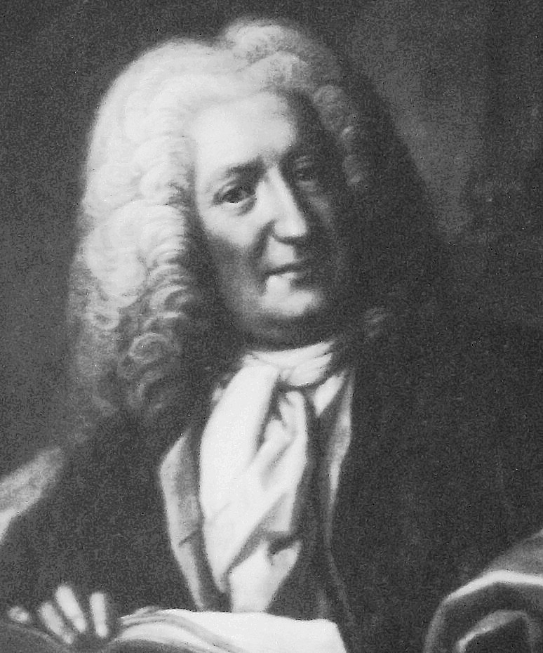 Arkitekt Göran Adelcrantz